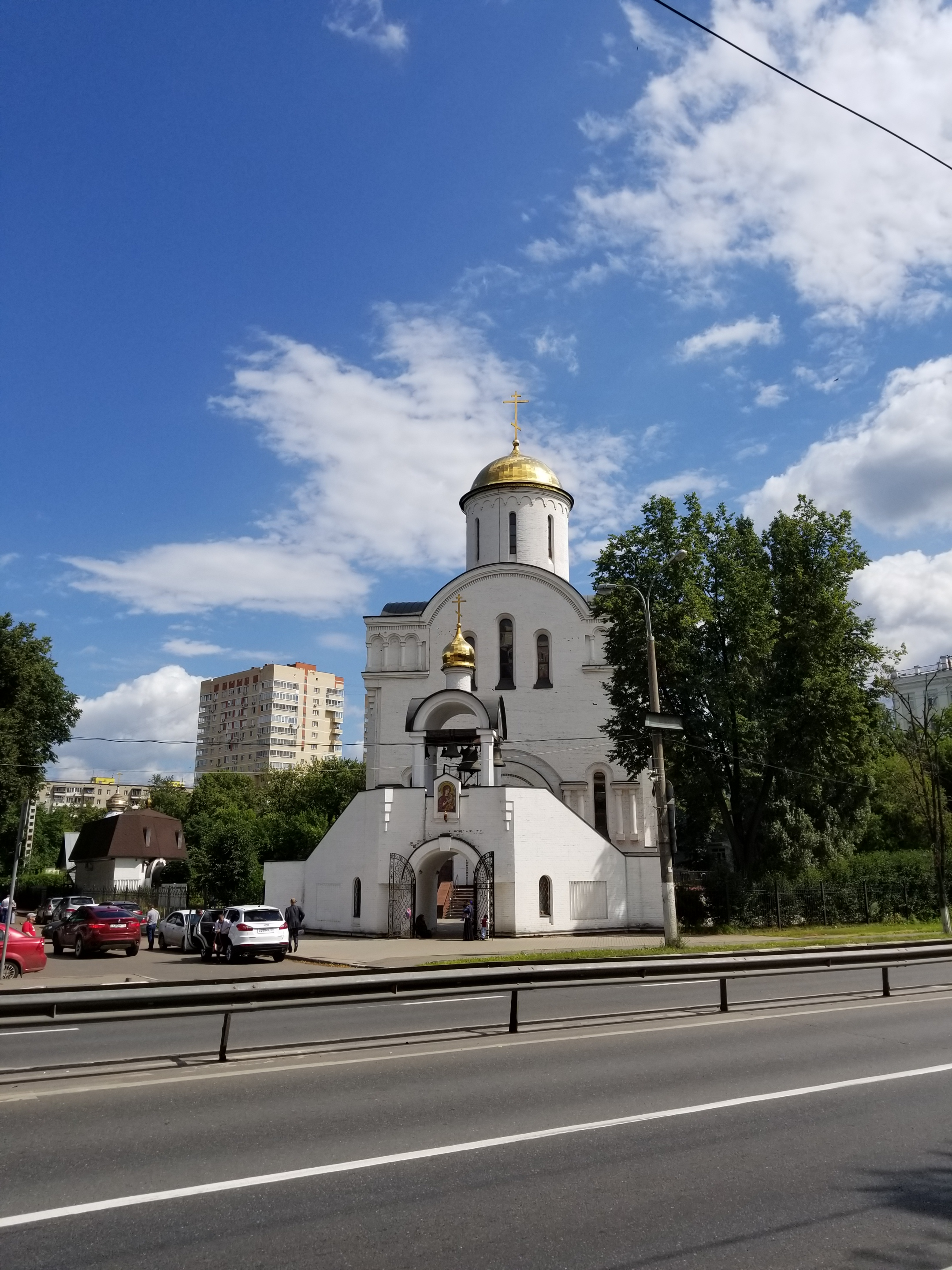 Храм Преображения Господня (август 2017)